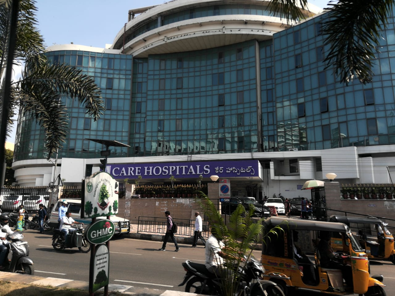 Care Hospital ,Banjarahills ,Road No.6,Hyderabad